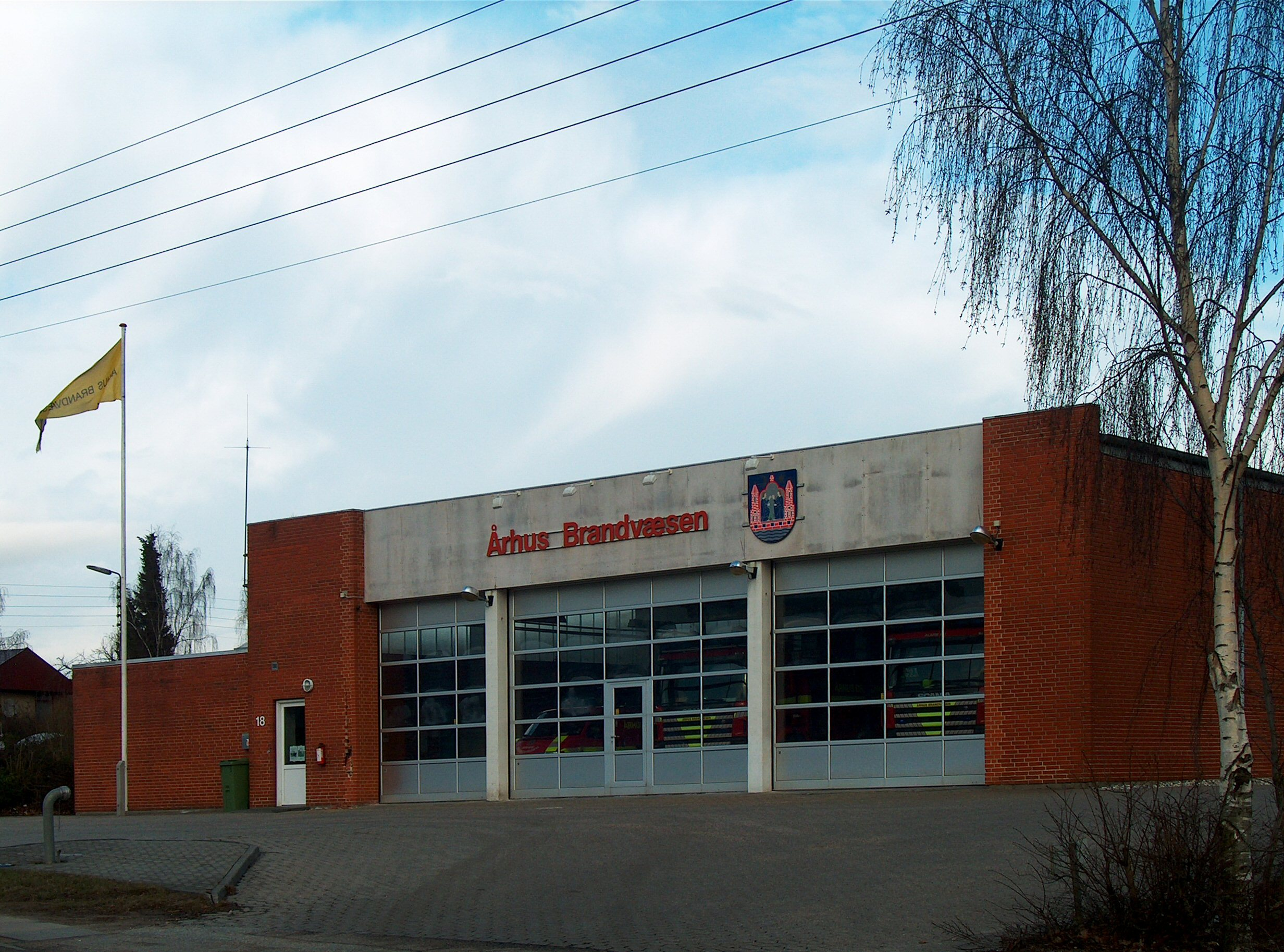 Århus Brandstation i Lystrup